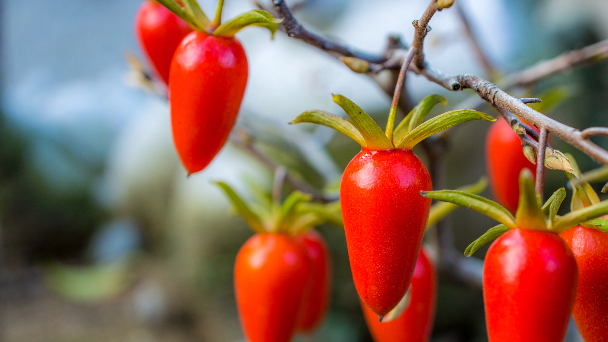 500px provided description: ?????????????Diospyros rhombifolia???????????????????????????????????? [#macro ,#flower ,#? ,#??? ,#?? ,#????? ,#??]